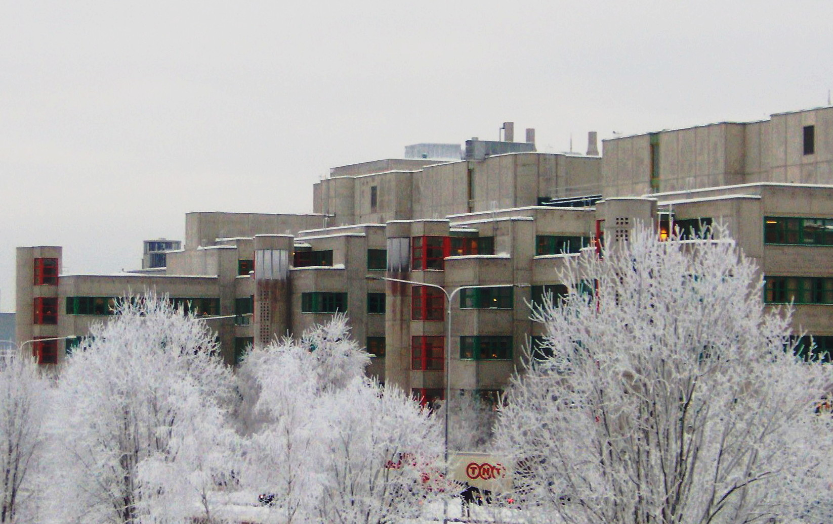 Novum i Flemingsberg, Huddinge, sydvästra Storstockholm, Sweden.